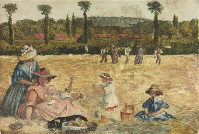 Haymaking, oil on board